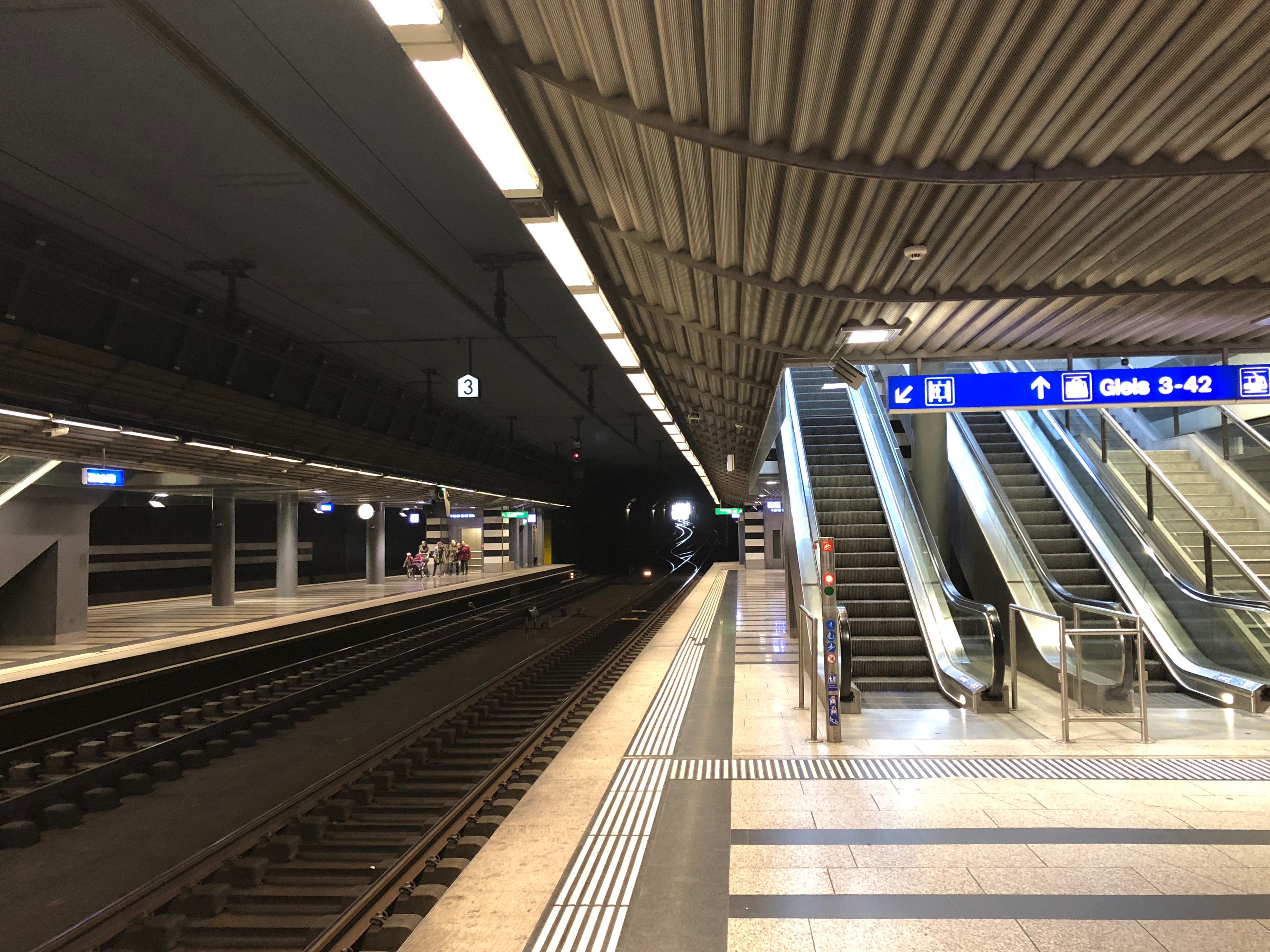 Bahnhof Museumstrasse, Zürich Hauptbahnhof